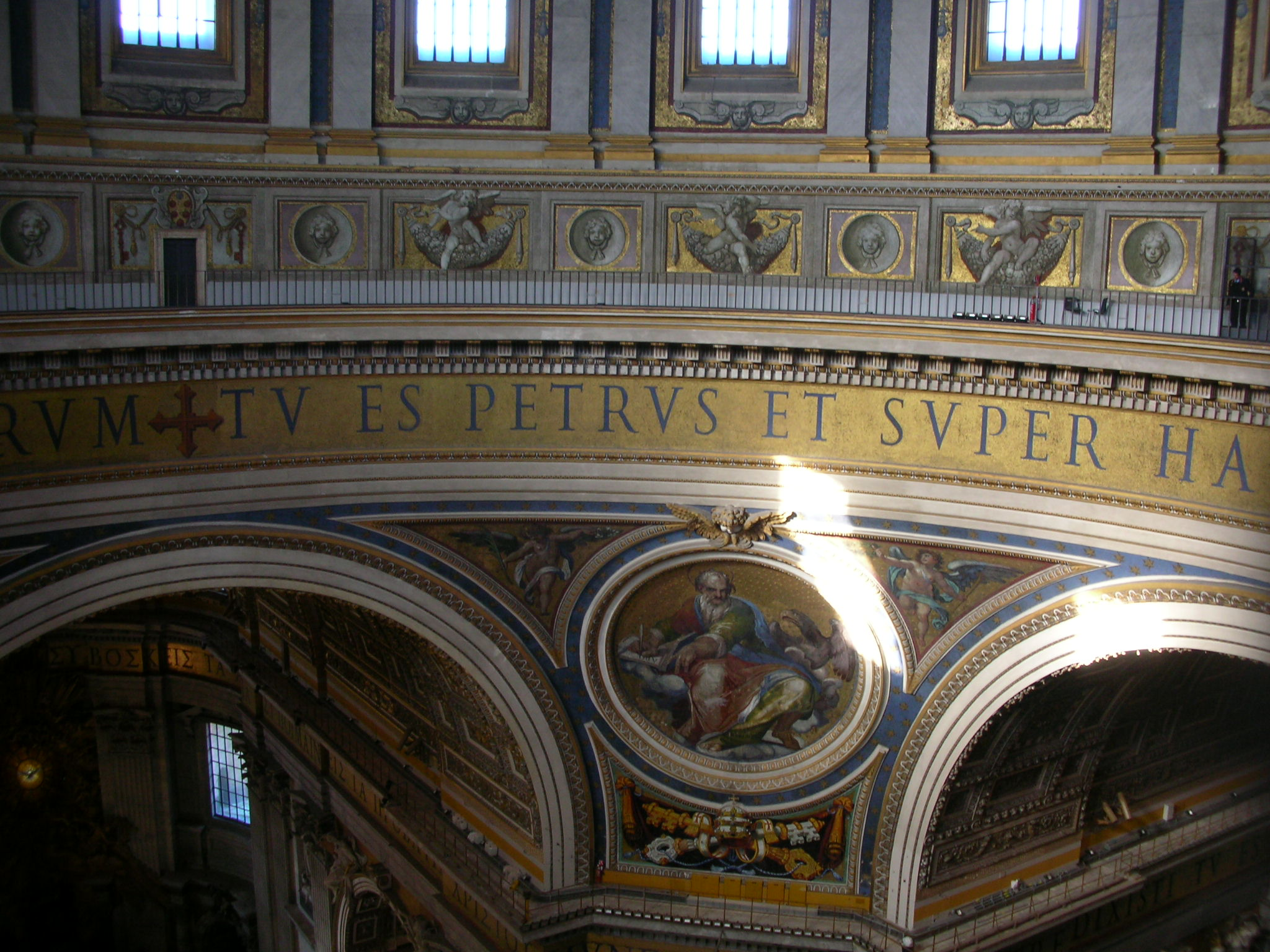 Mosaico con la scritta "Tu es Petrus et super hanc petram", Basilica di San Pietro (Roma)